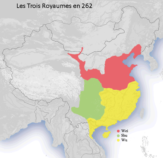 Les Trois Royaumes en 262